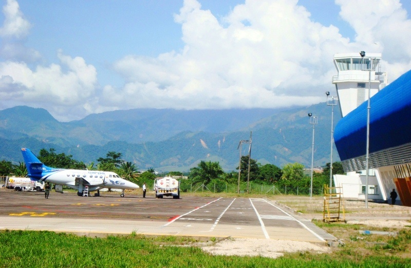 BAe Jetstream 32EP de Sarpa en el aeropuerto Gustavo Artunduaga de Florencia (Caquetá).